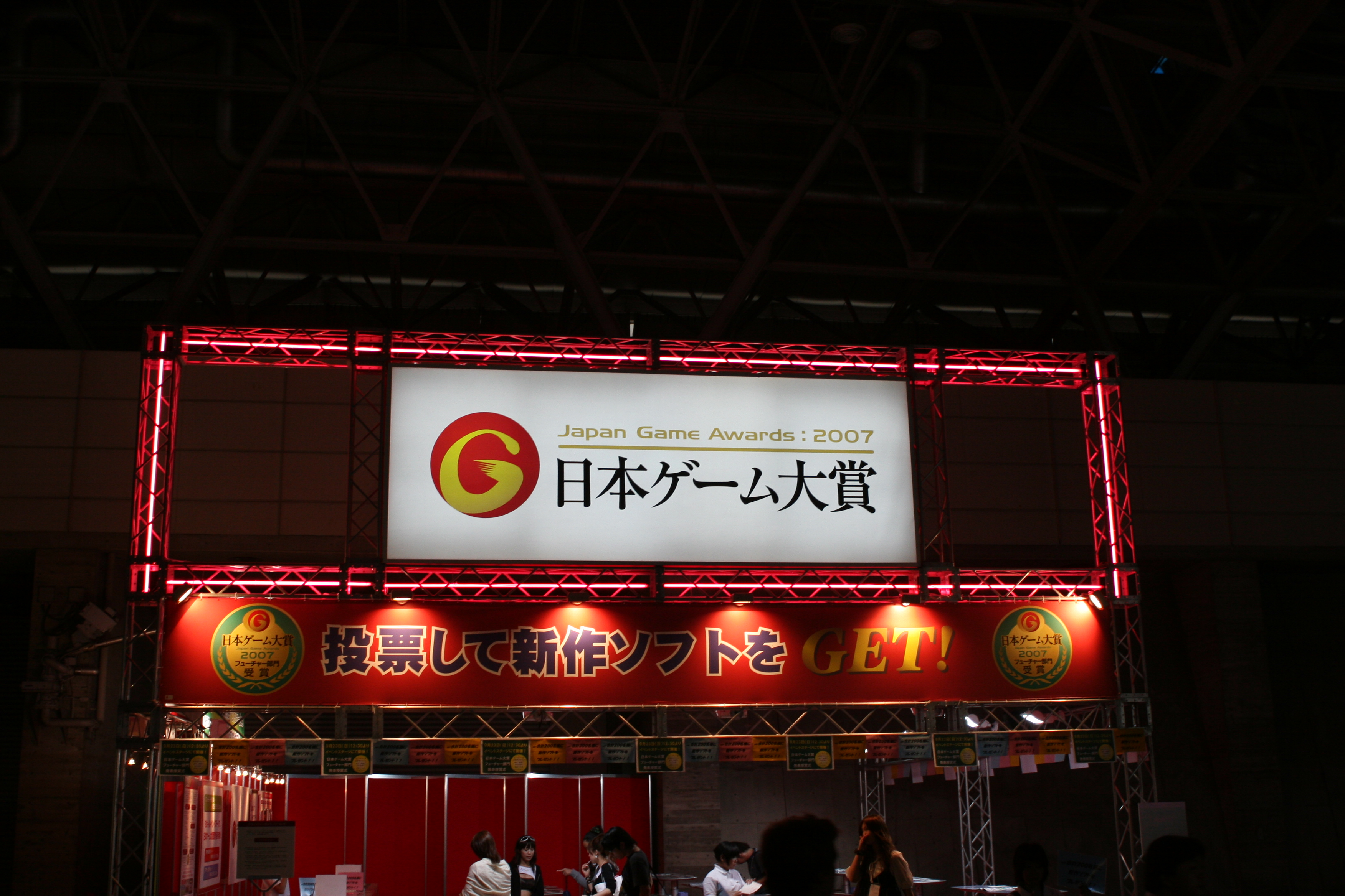 2007東京電玩展，2007日本遊戲大獎攤位。